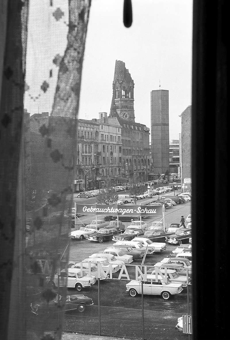 Blick aus dem Fenster an der Augsburger Straße über den heutigen Los-Angeles-Platz auf die Rankestraße und die Kaiser-Wilhelm-Gedächtniskirche in Berlin-Charlottenburg.